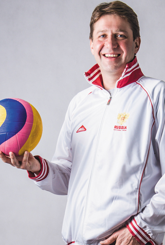 Дмитрий Стратан. Заслуженный мастер спорта по водному поло. Серебряный призер Олимпийских игр (Сидней, 2000) и бронзовый призер Игр (Афины, 2004), обладатель Кубка мира, победитель Мировой лиги, победитель Игр доброй воли, многократный чемпион и обладатель Кубка России. Фотография из серии «Лица эстафеты».